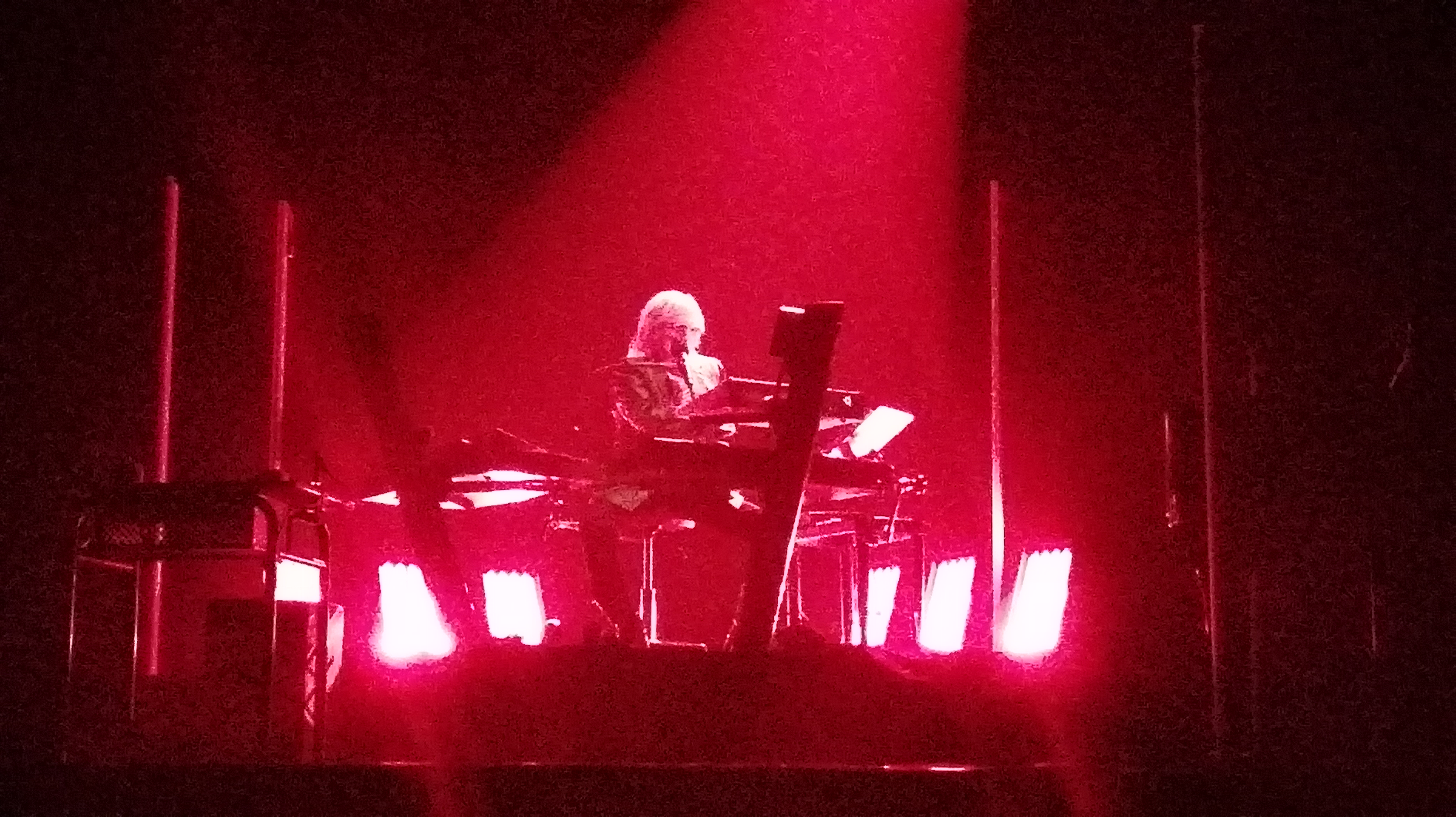 Christophe en concert au centre Robert Desnos de Ris Orangis, le 13 février 2020.